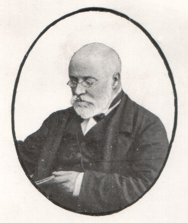 Gerolamo Da Passano, pedagogista